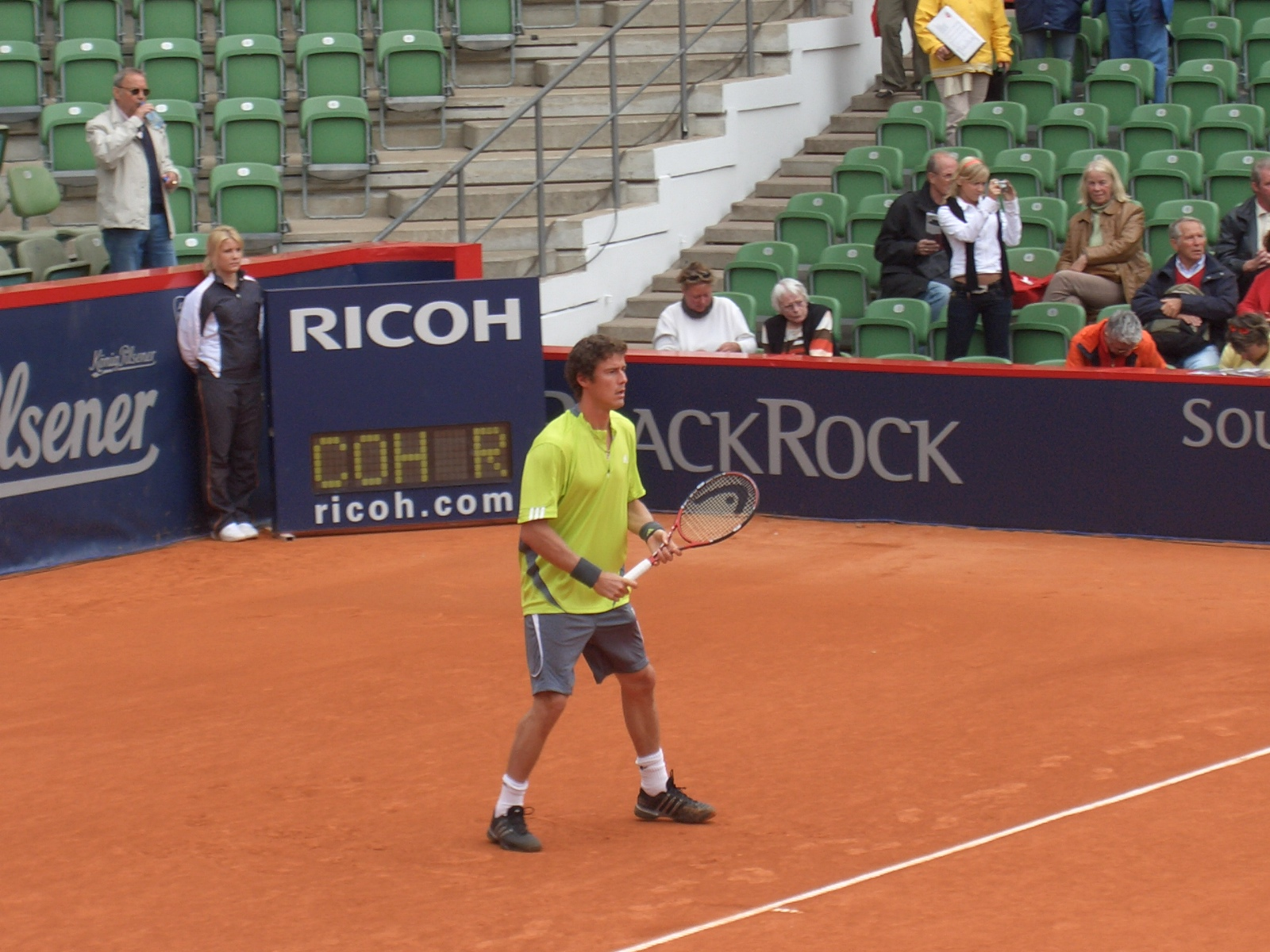 Марат Сафин Автор: [Потребител:HSV